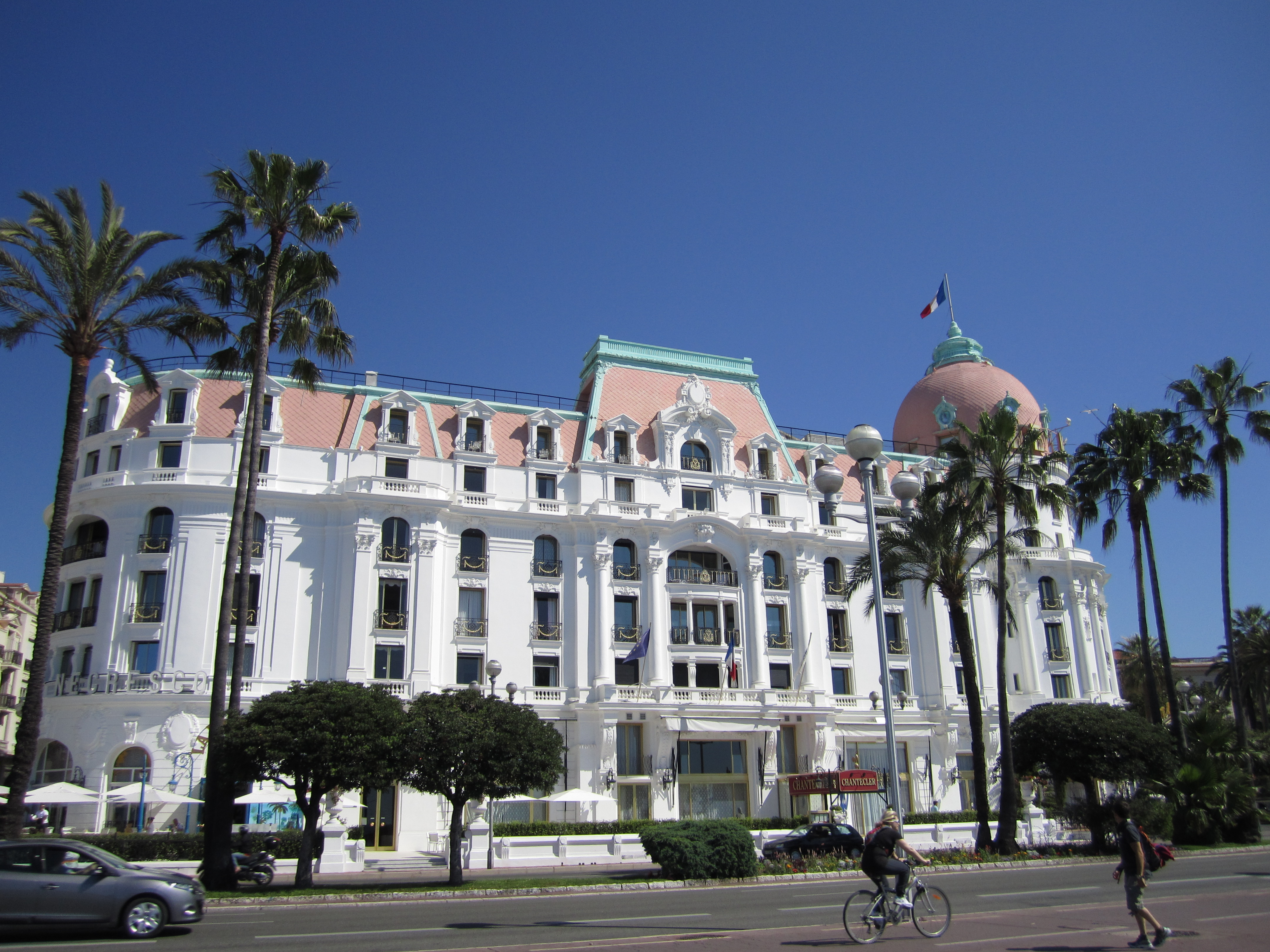 Hôtel Le Negresco à Nice situé sur la célèbrissime Promenade des Anglais! Avec les palmiers et le ciel bleu de cette photo, on se croirait en Floride